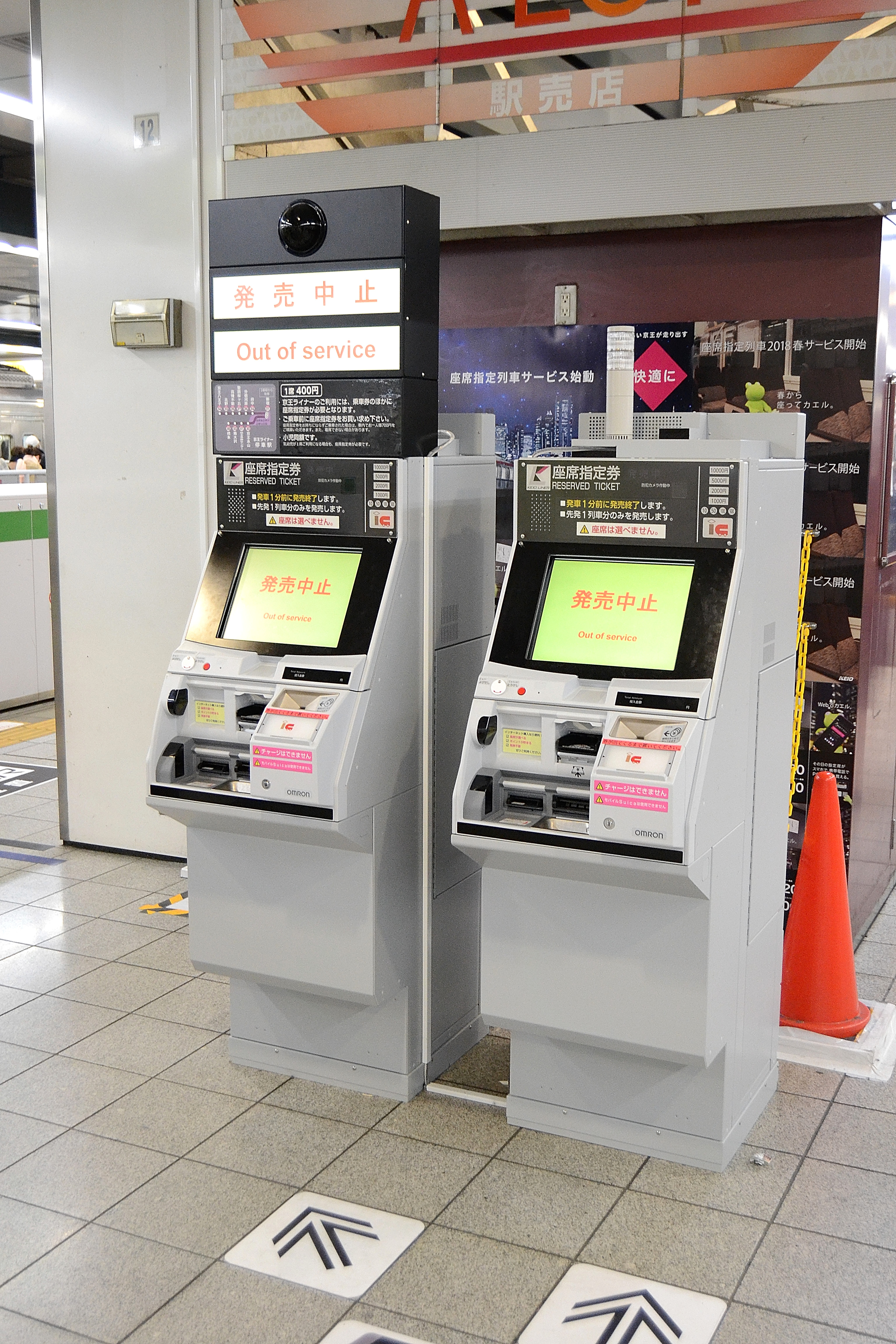 京王電鉄京王線新宿駅ホームに設置されている「京王ライナー」の自動券売機